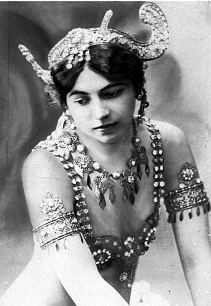 Matada en